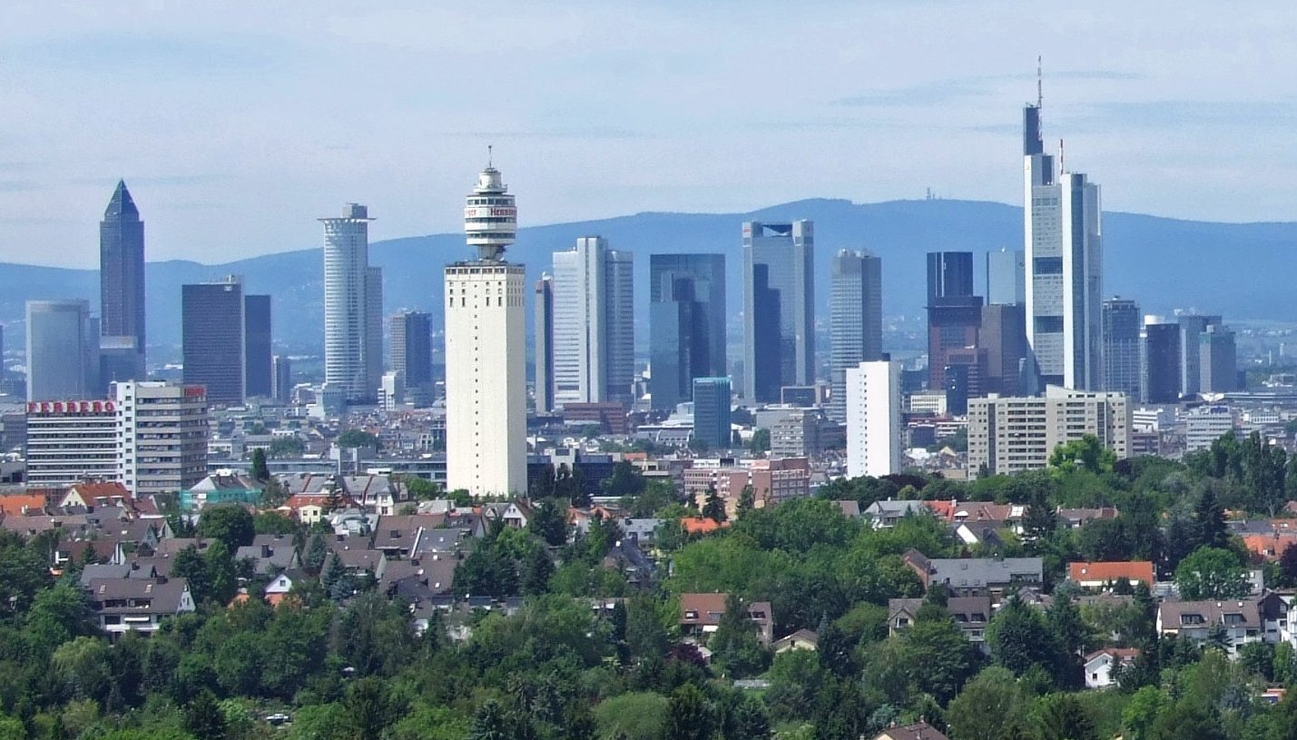 Henninger-Turm vor der Skyline von Frankfurt am Main